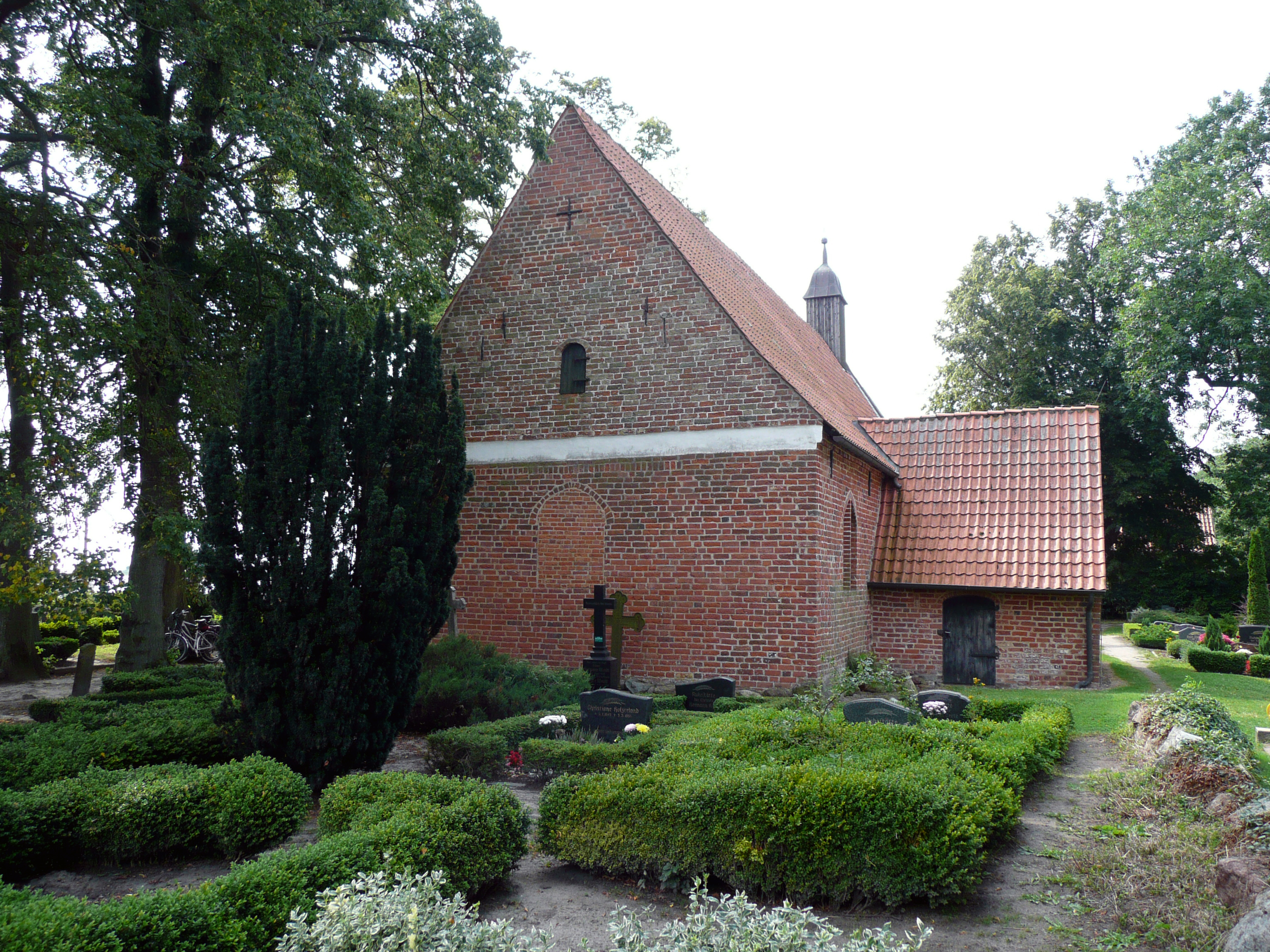 Ostseite der Kirche St. Marien in Waase auf Ummanz bei Rügen